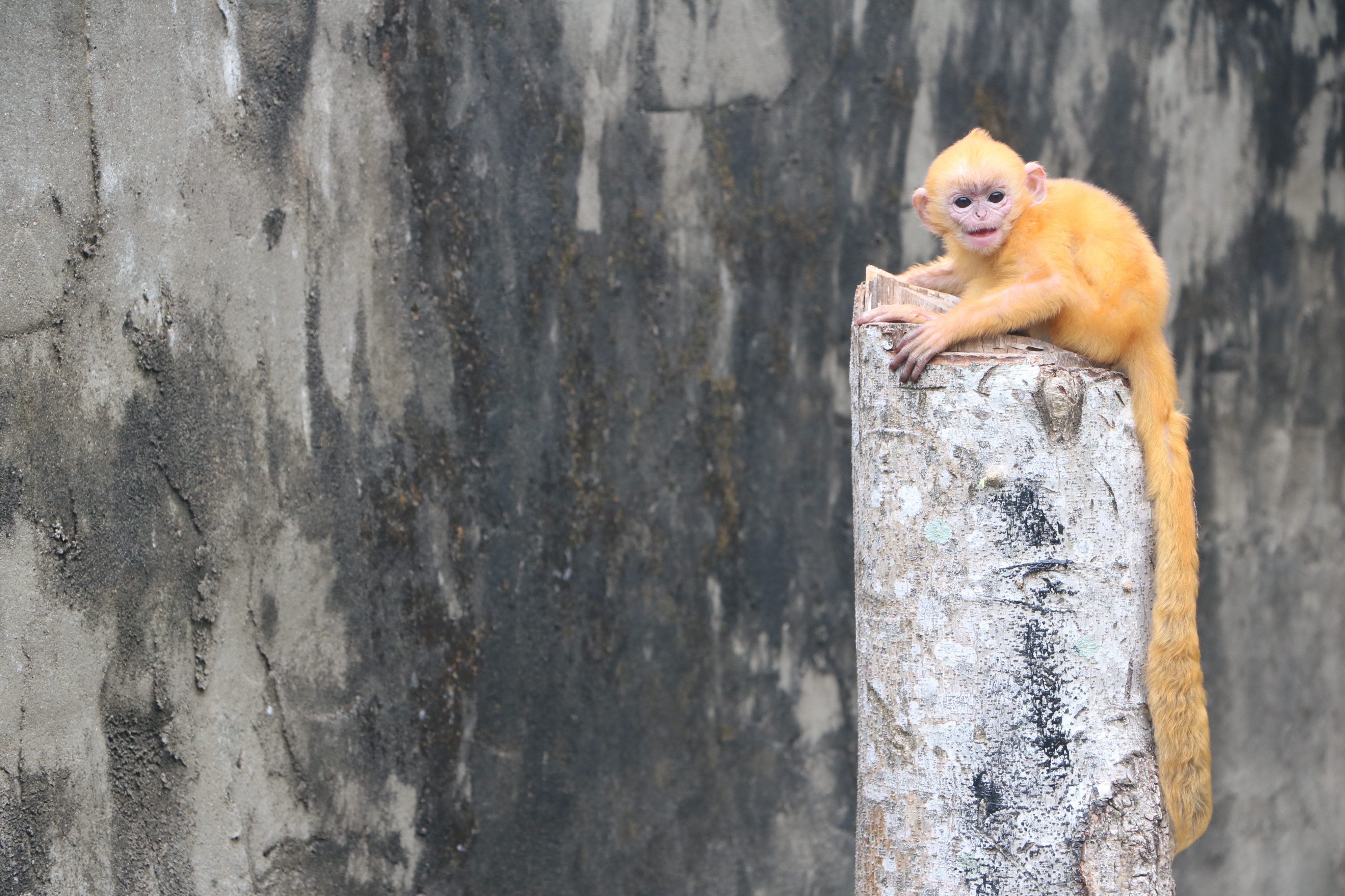 Anak Lutung Kelabu